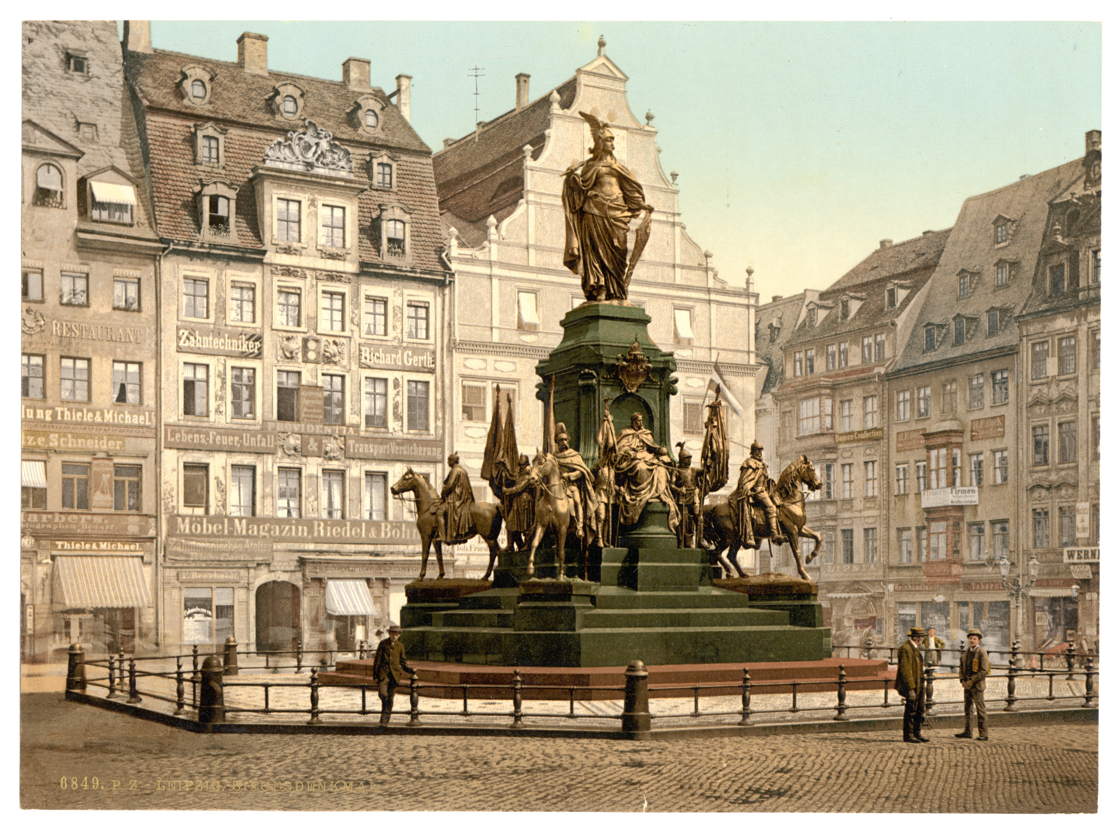 Leipzig Siegesdenkmal um 1900 (von Rudolf Siemering, Germania von Hermann Heinrich Howaldt), enthüllt 1888, zerstört 1946